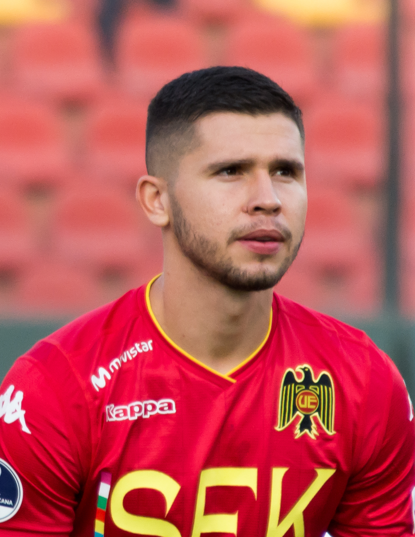 Mauro Caballero, Unión Española v Mushuc Runa, Estadio Santa Laura, Independencia, Santiago, Región Metropolitana, Chile.